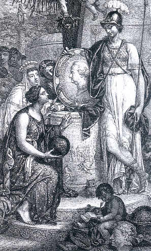 Joseph Fratrel, Apotheose des Kurfürsten Karl Theodor von der Pfalz